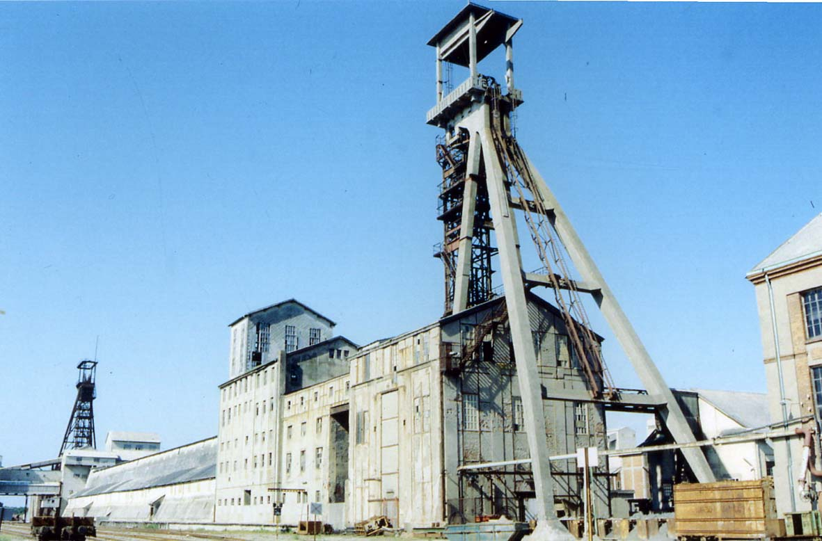 Chevalements des puits Marie au premier plan et Marie-Louise au fond